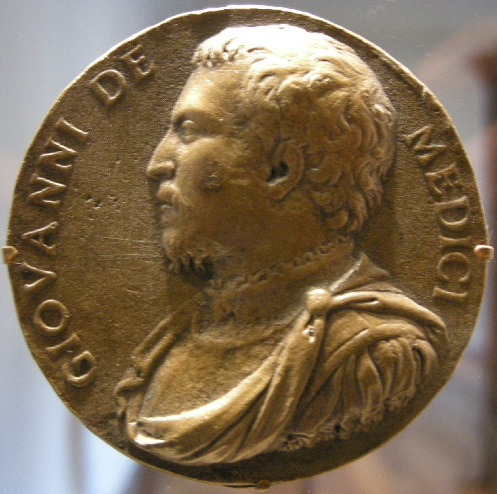 Giovanni delle Bande Nere, 1546 ca.